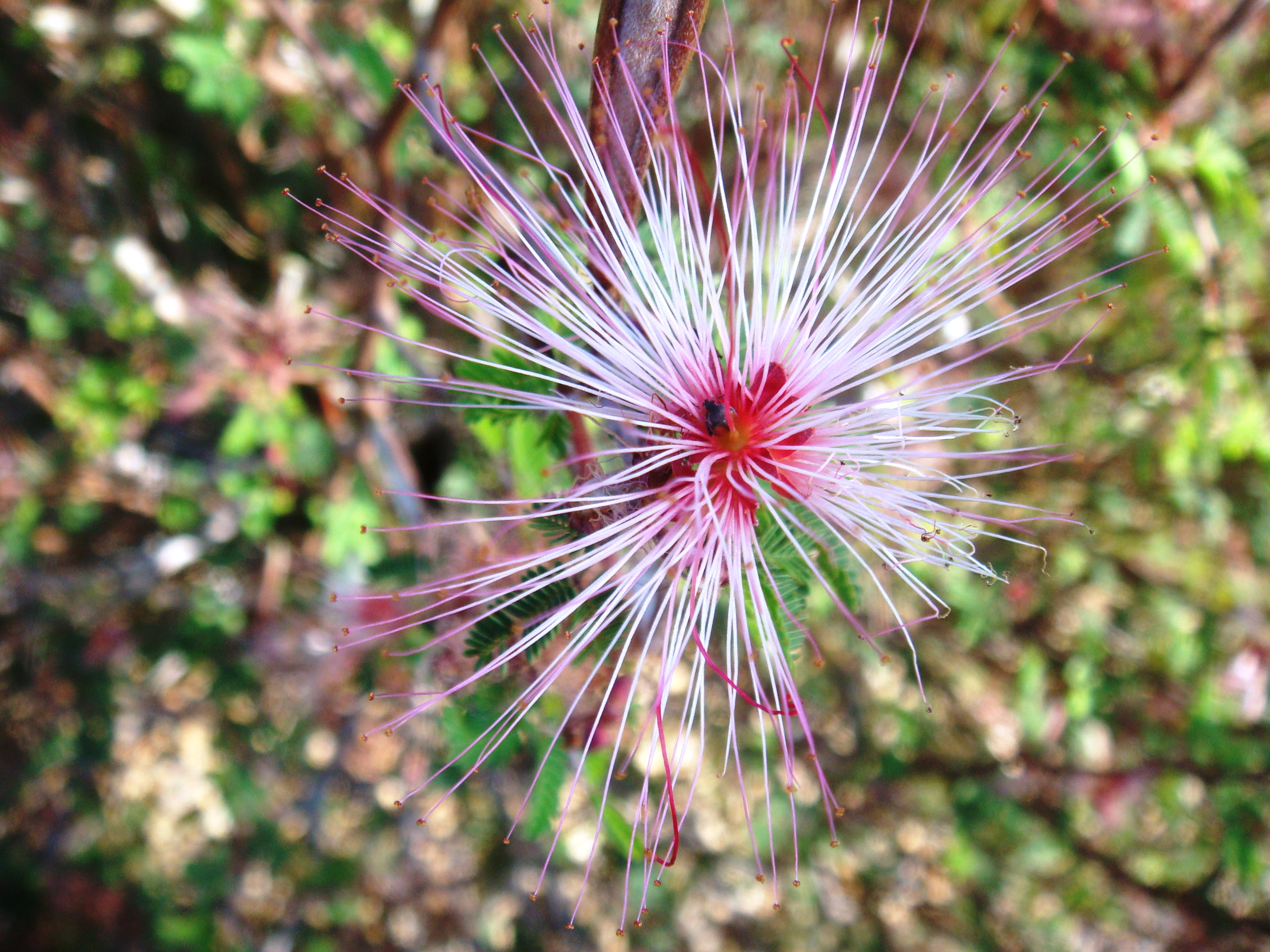 Calliandra eriophylla, cultivated, private residence, Paradise Valley, Arizona